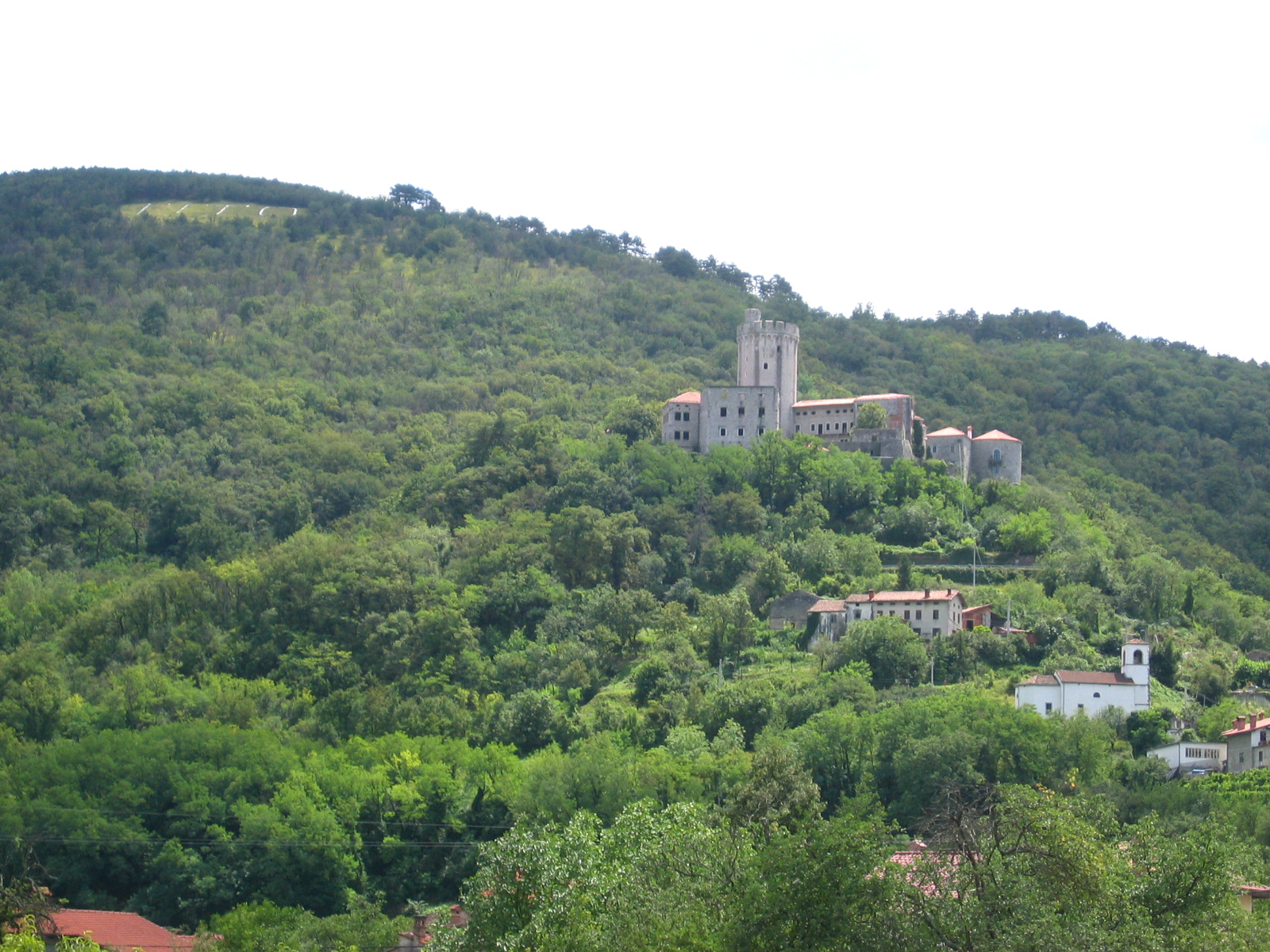 Banik (Rihemberk) castle, Slovenia